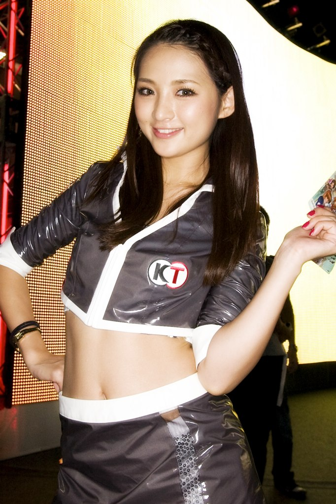 2009東京電玩展，光榮特庫摩攤位的宣傳模特兒鈴木咲。